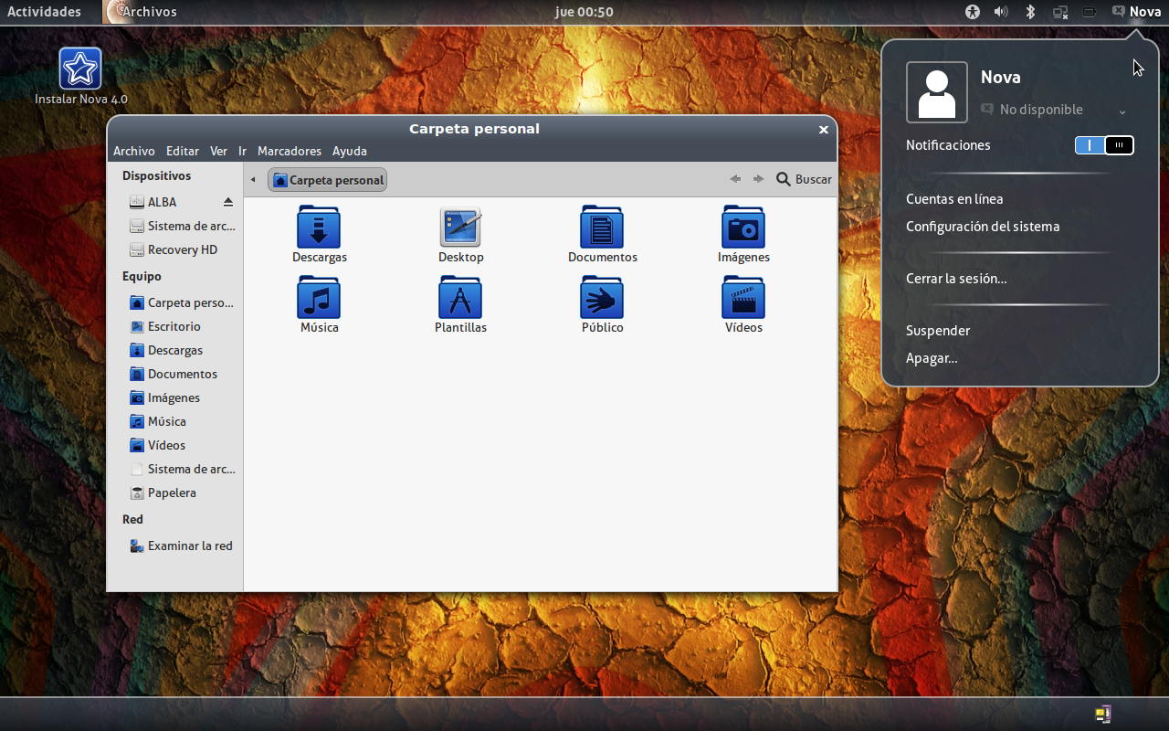 Nova Linux 4.0 (Screenshot)